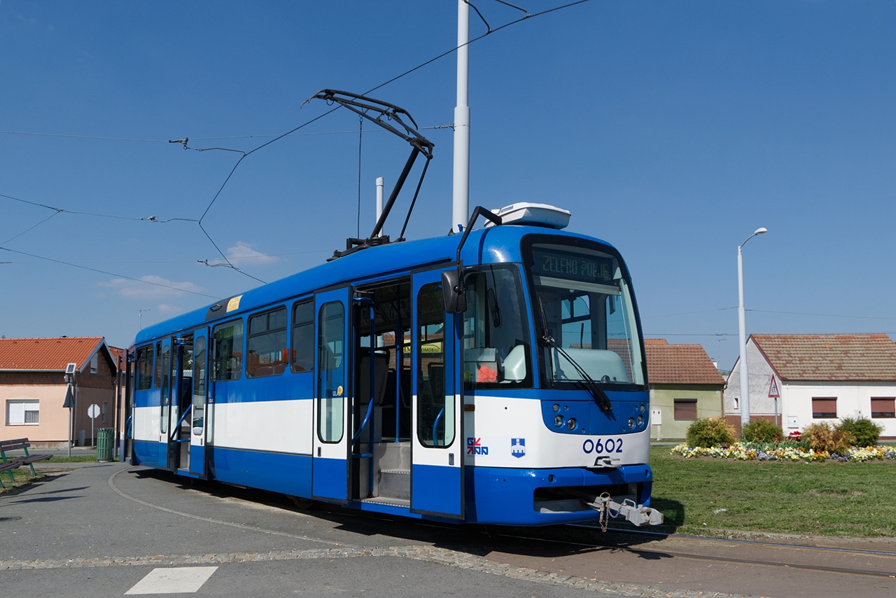 Tatra T3R.PV w Osijeku, Chorwacja